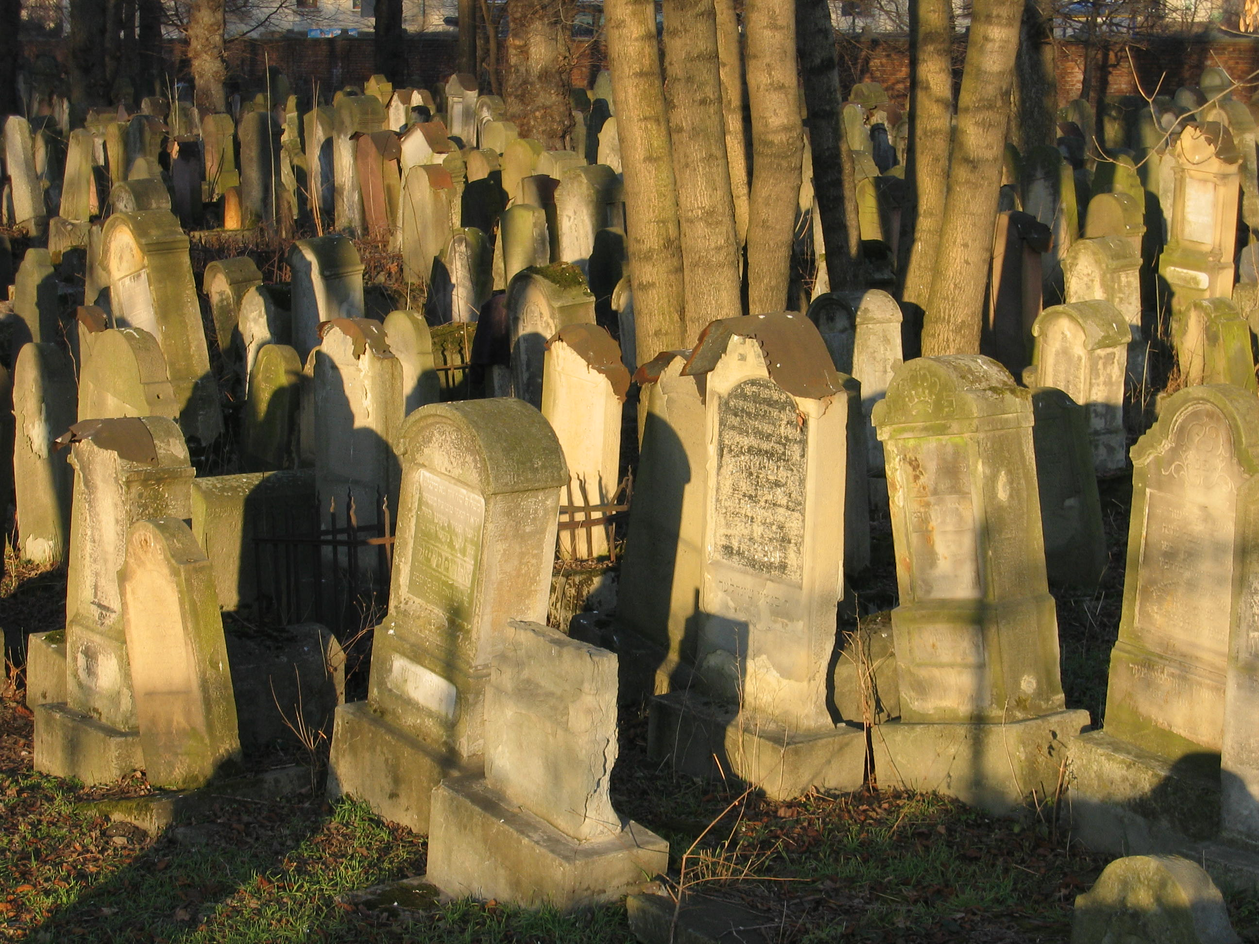 Cmentarz żydowski w Tarrnowie